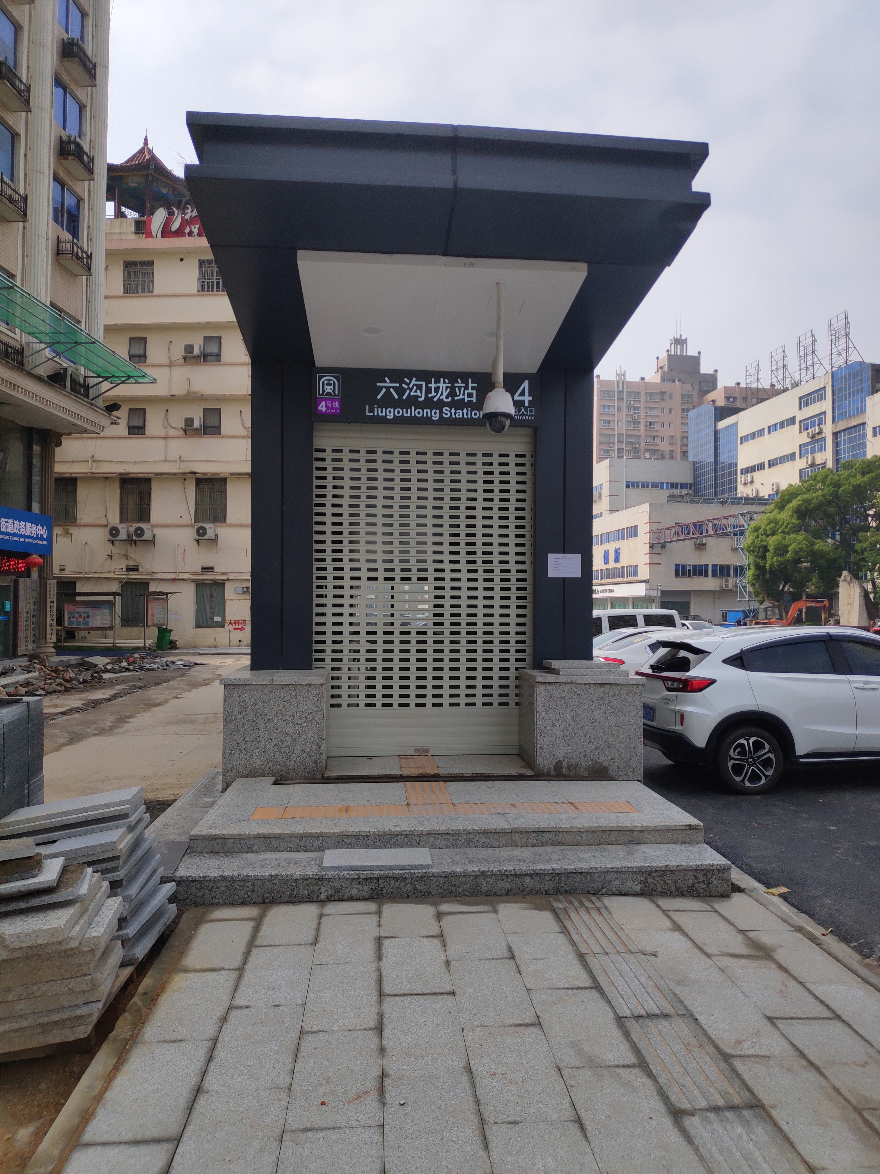 中文（香港）: 長沙地鐵4號線六溝垅站4號出入口